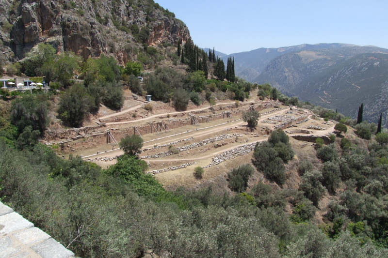 Museum Delphi Ausgrabungsgebiet